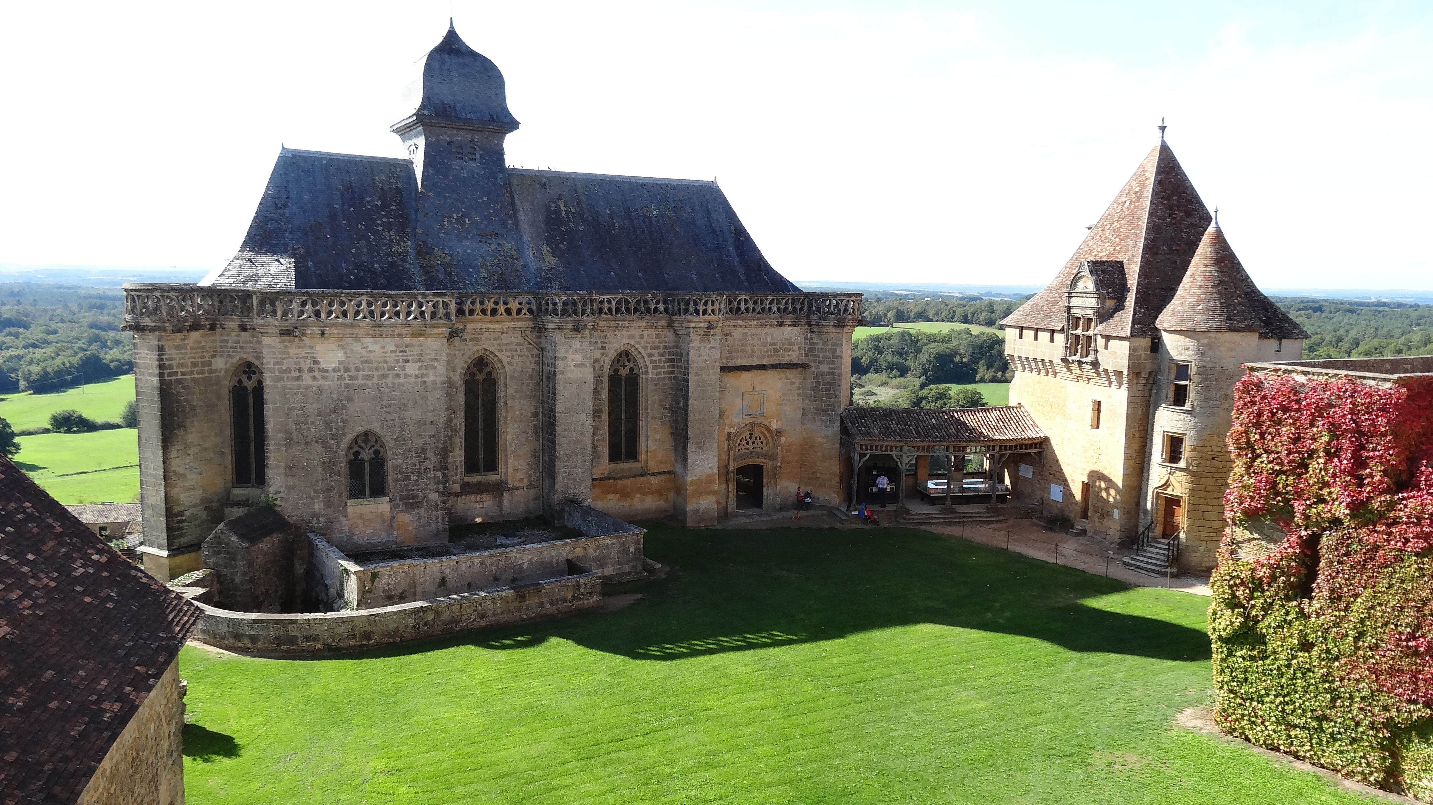 La chapelle du chapitre seigneurial XVIe s. (château de Biron (Dordogne))